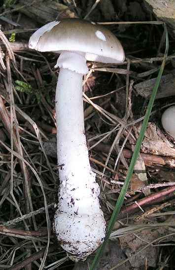 Amanita spissa var. excelsa - Amanitaceae - Agaricales